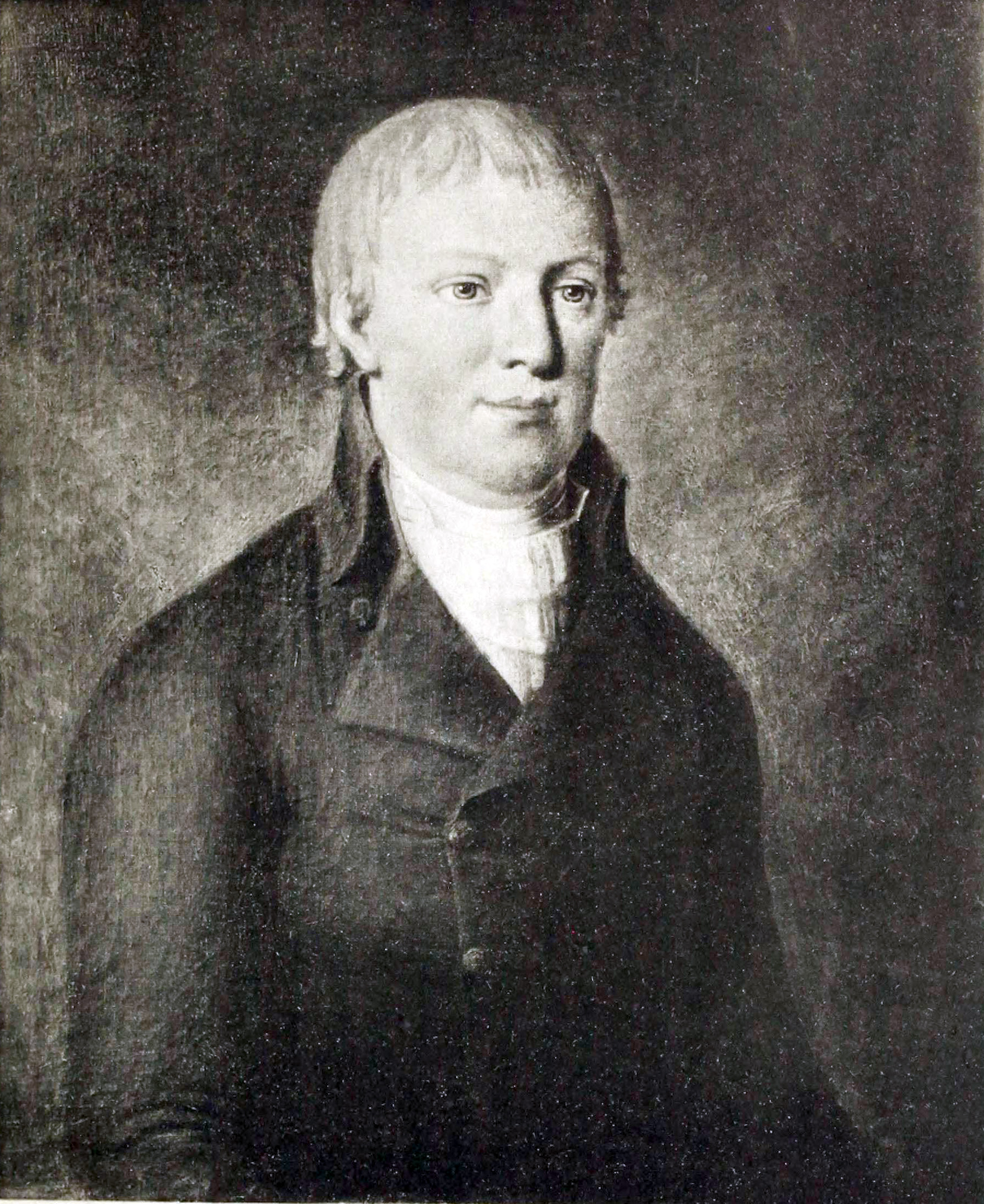 Caspar Trendelenburg (1755-1820). Äldre man, bröstbild, fas t. v., med blå ögon, grått framkammadt hår, röd-lätt hy. Hvit lindad halsduk, hög hvit väst med uppstående krage utan slag, knäppt på höger sida, grön lifrock med uppstående nedvikt krage, korta slag, två rader klädda knappar, knäppt. Bakgrund orangeflammig himmel, signerad t. v. A. J. Hansson Pinx 1806. Olja på duk, 73V2 x 62 ctm., af Anders Johan Hansson 1806. Lunds universitet.